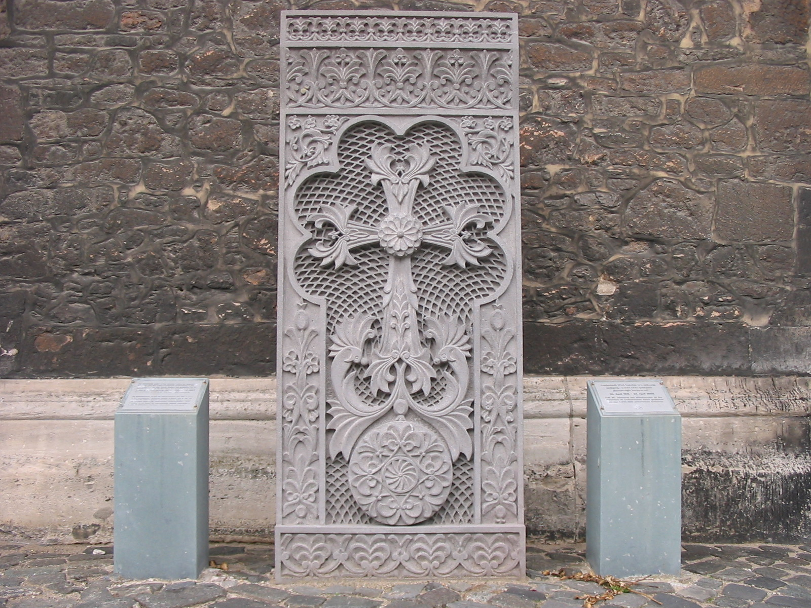 Braunschweig Khatchkar Denkmal